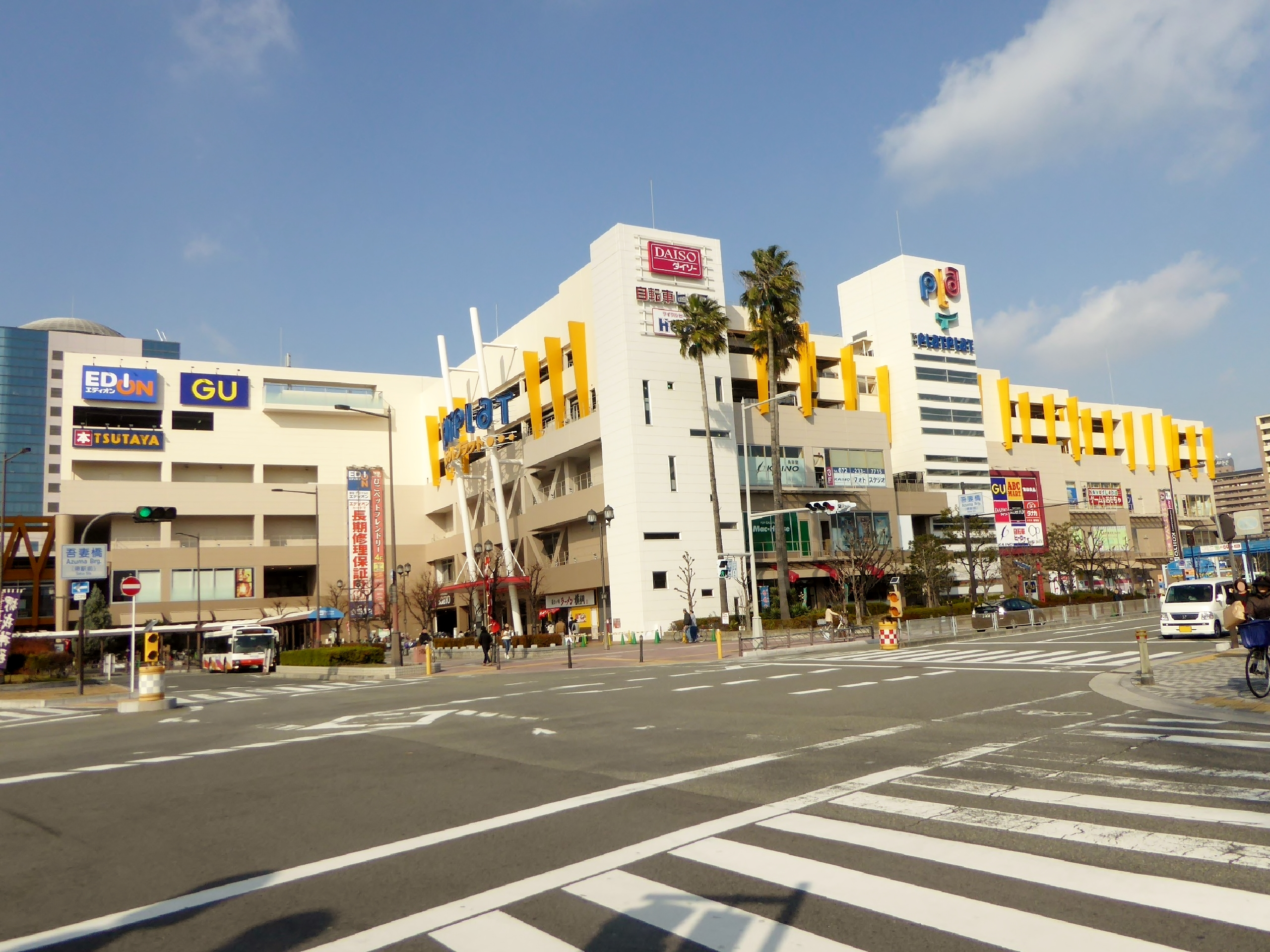 プラットプラットを撮影。